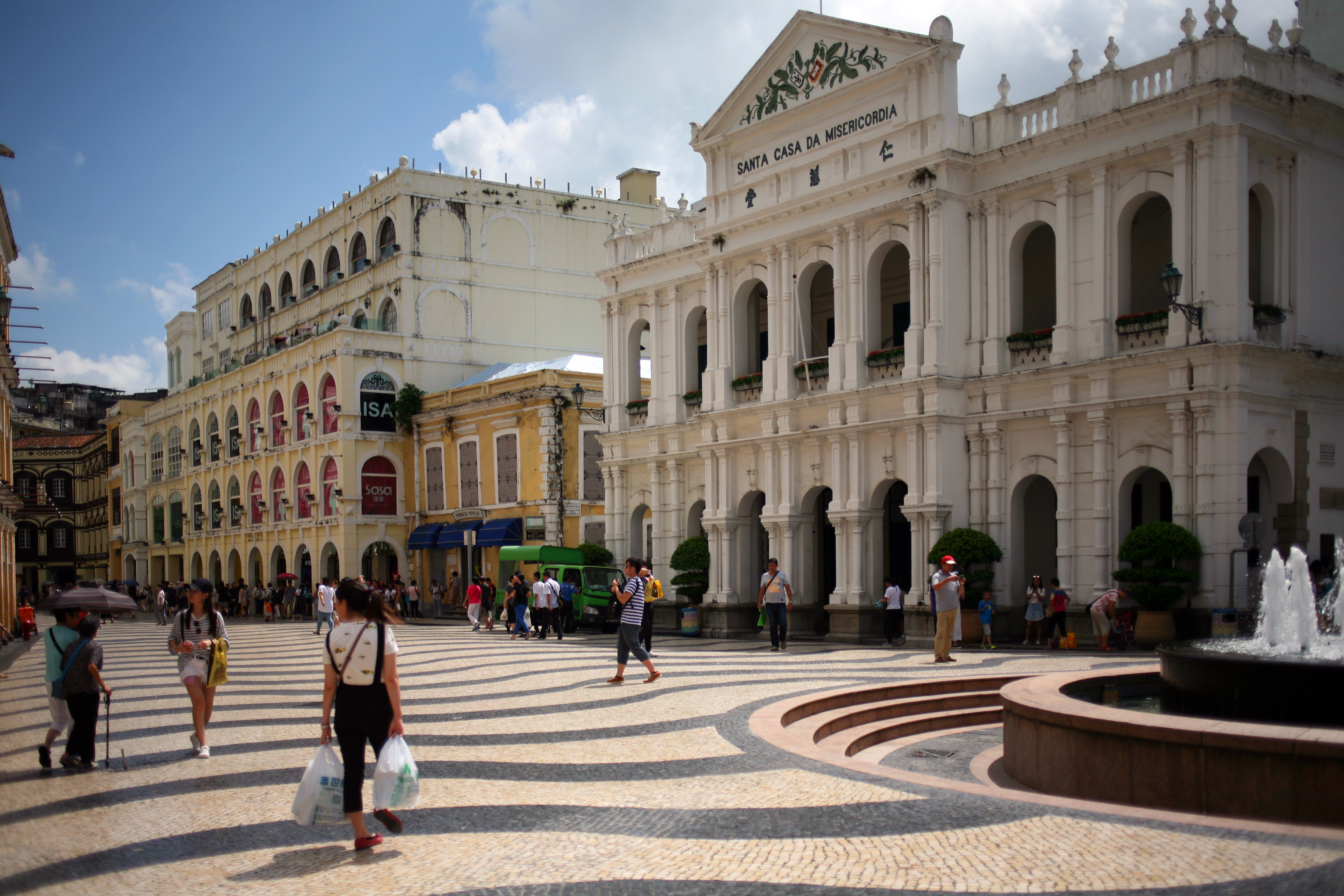 La Santa Casa da Misericordia, in Largo do Senado, Macao